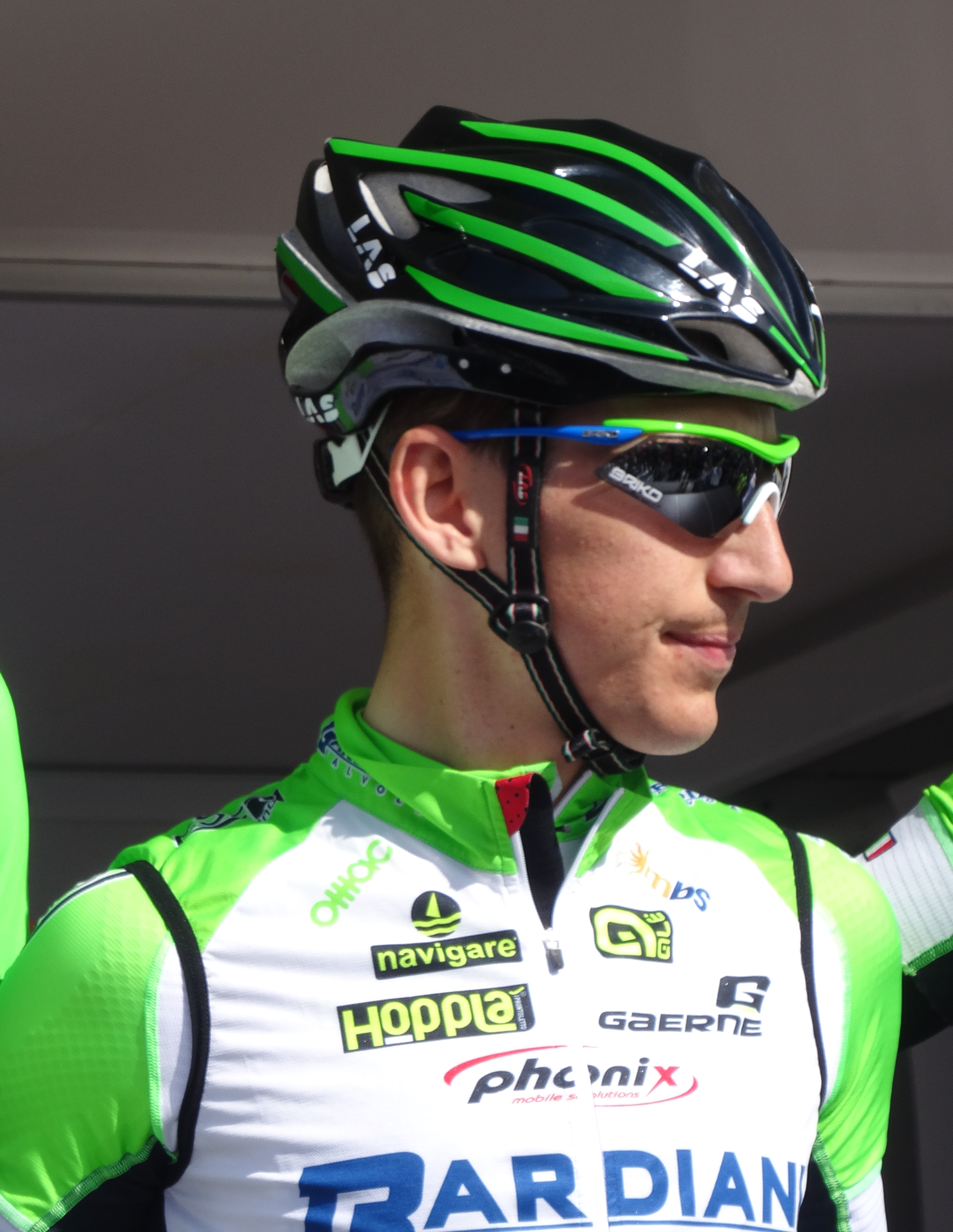 Reportage réalisé le jeudi 17 avril à l'occasion du départ et de l'arrivée du Grand Prix de Denain 2014 à Denain, Nord, Nord-Pas-de-Calais, France.